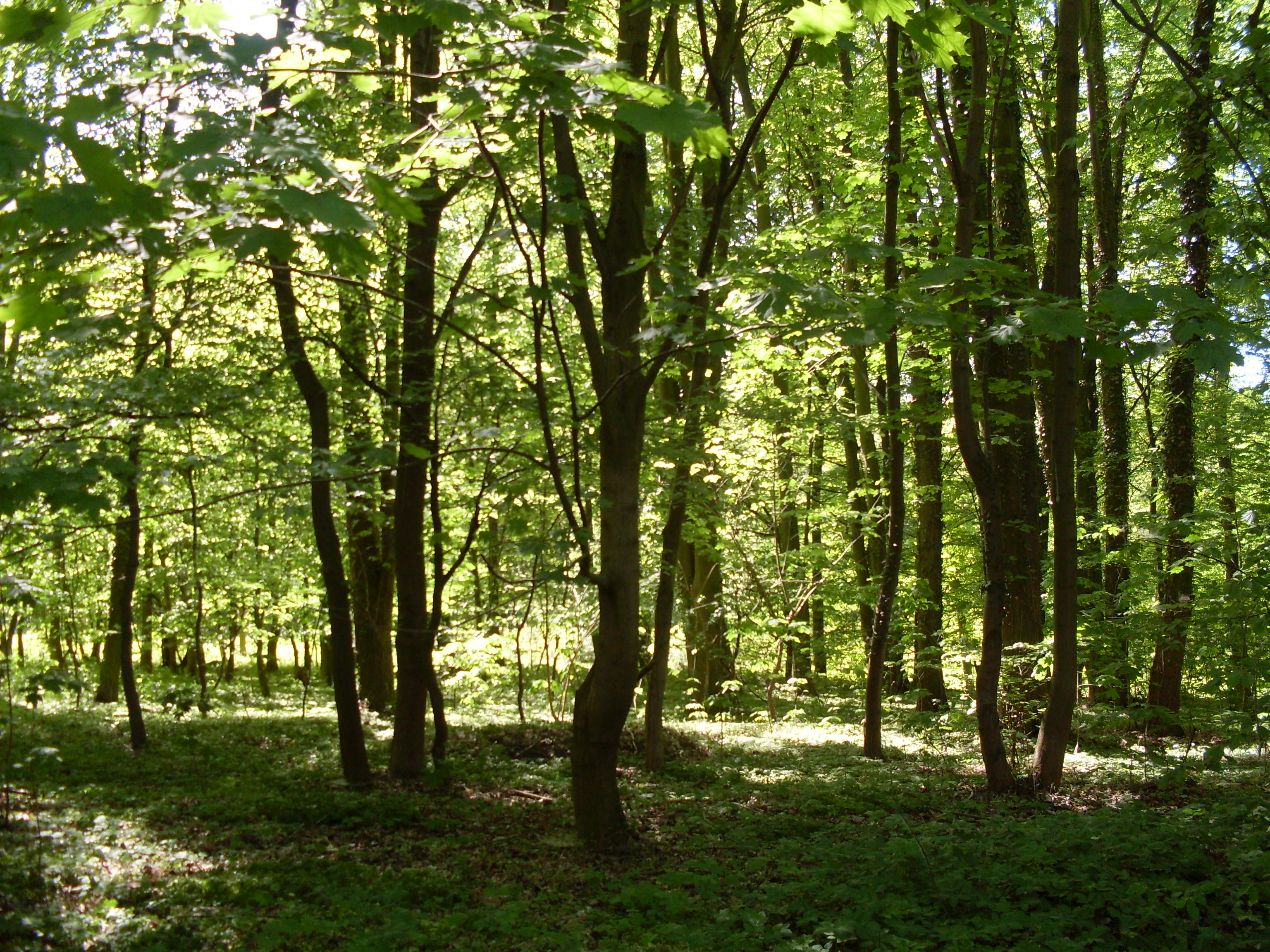 Ueckermünder Heide (Puszcza Wkrzańska) in Police - Mścięcino